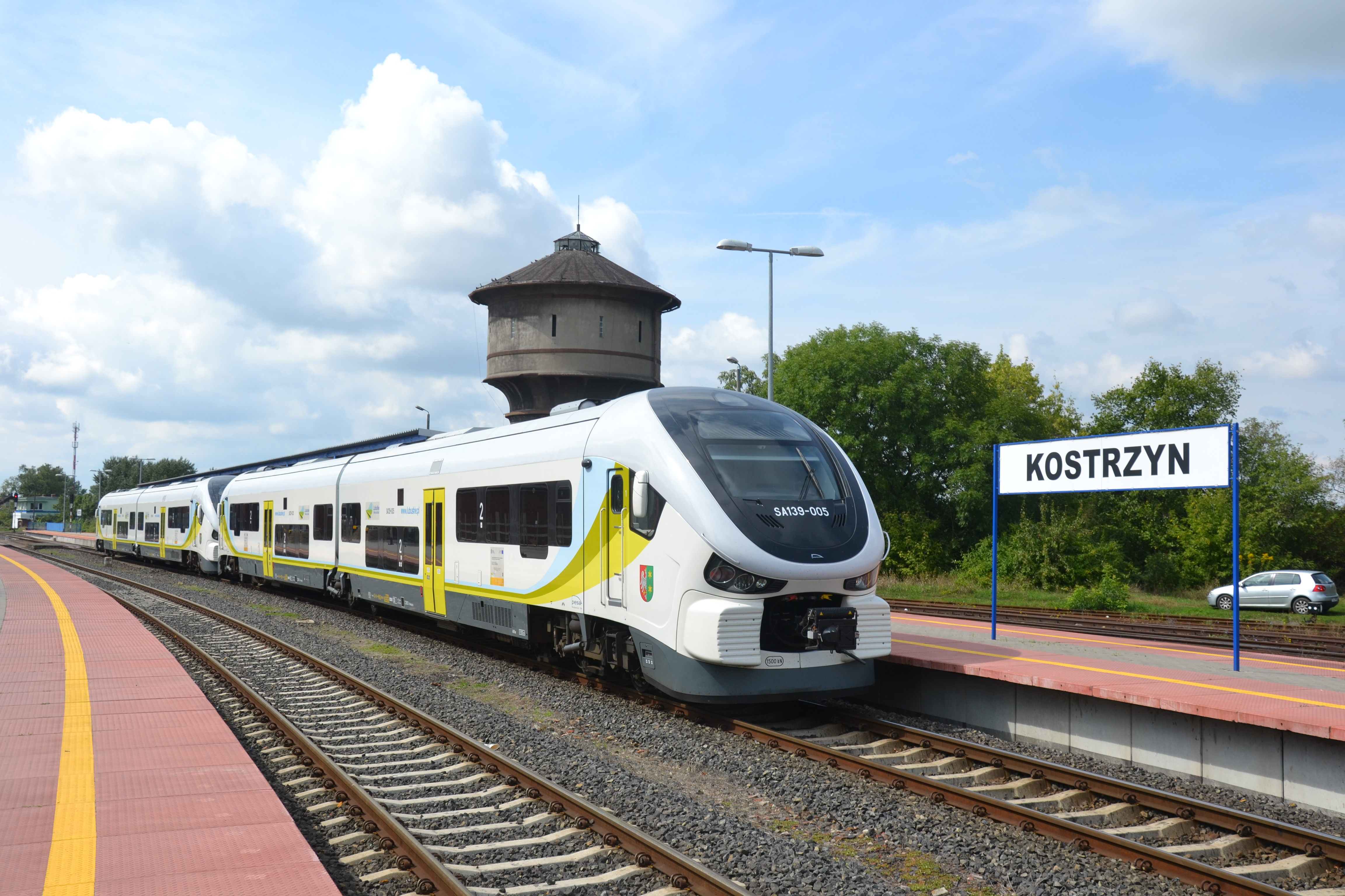 Dwa SA139 na górnych peronach dworca Kostrzyn This photo was taken during Railway Wikiexpedition 2014 set up by Wikimedia Polska Association in cooperation with Fundacja Grupy PKP. You can see all photographs in category Wikiekspedycja kolejowa 2014.